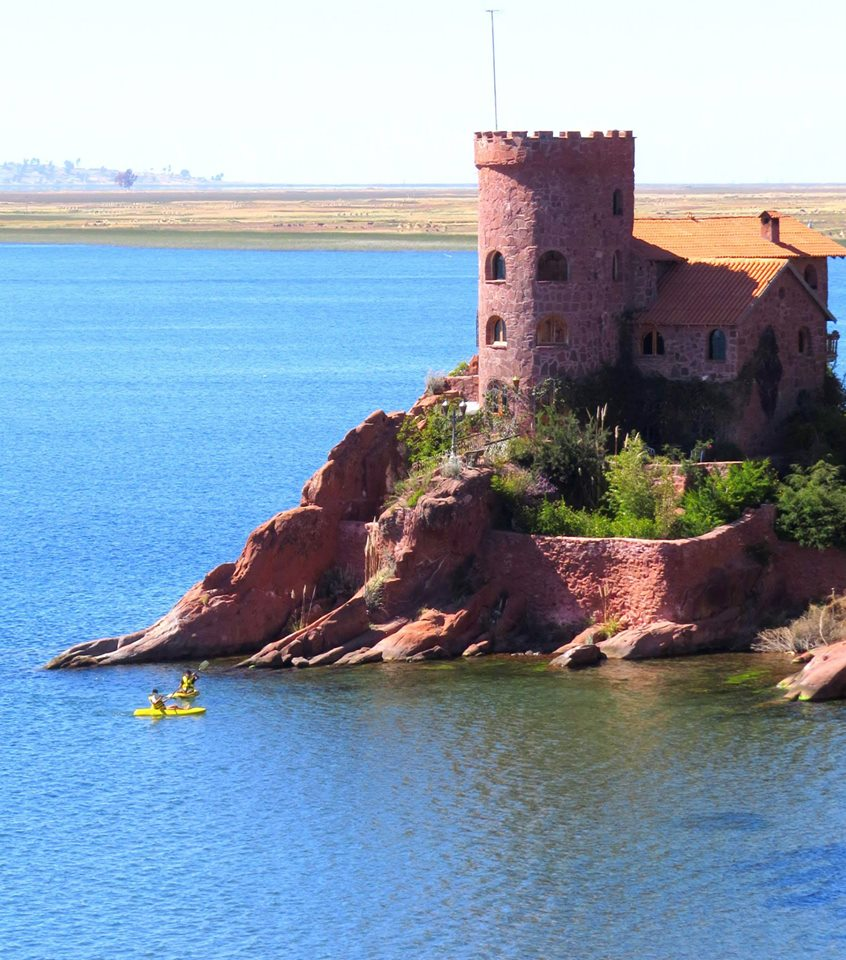 Platería Puno Peru